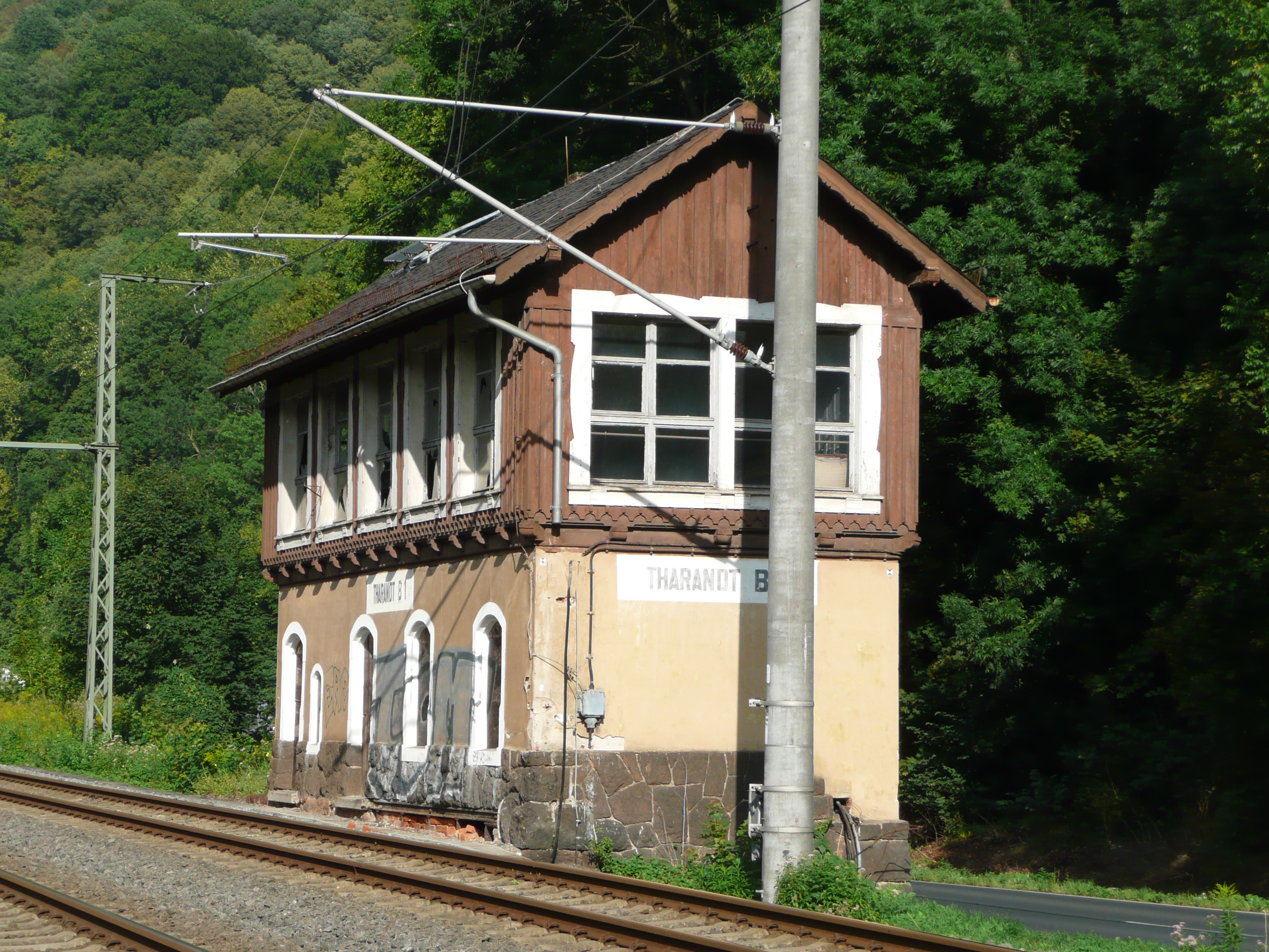 Bahnhof Tharandt Stellwerk B1, am 9. Januar 2016 abgerissen